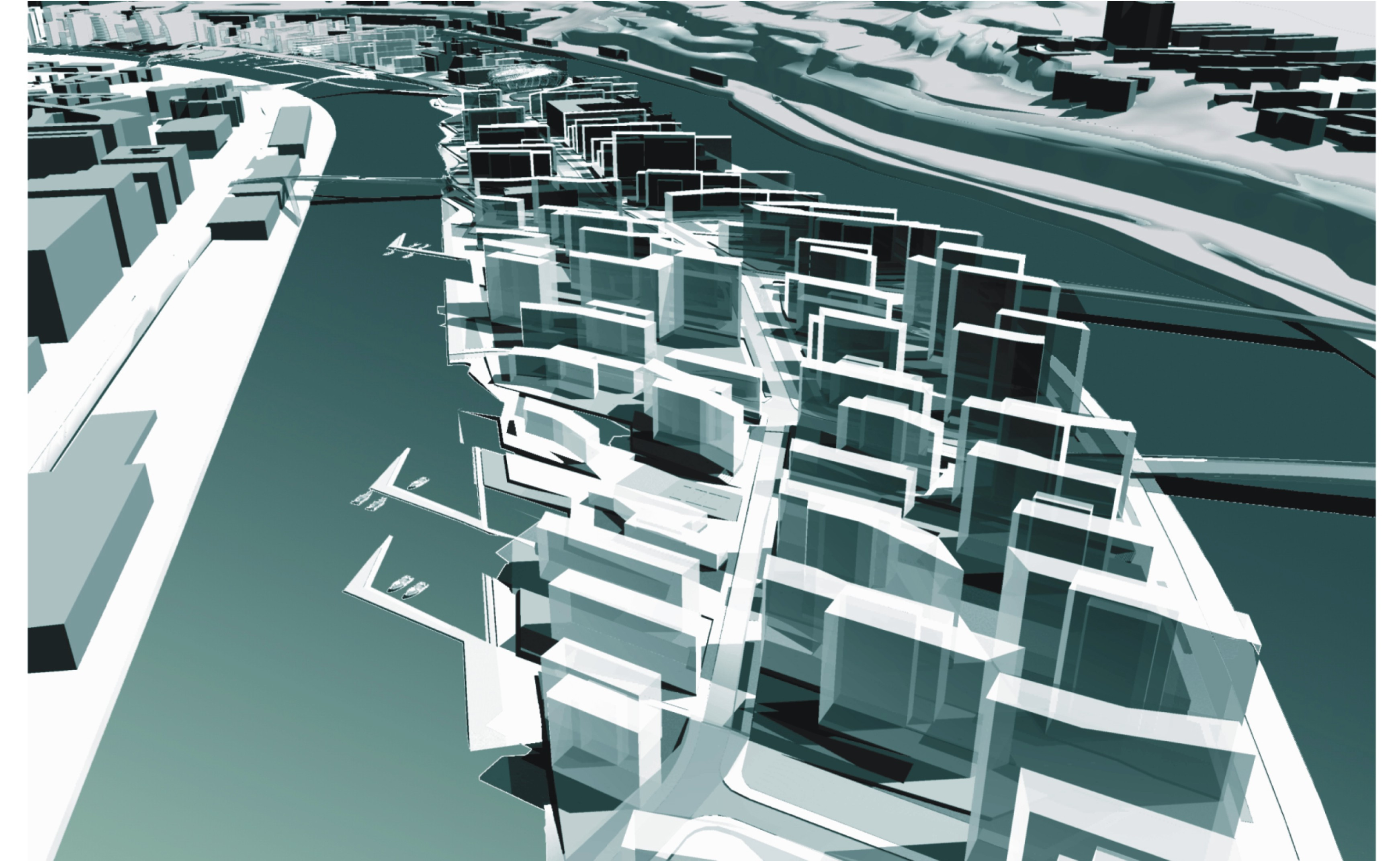 Projecte del barri de Zorrotzaurre, Bilbao